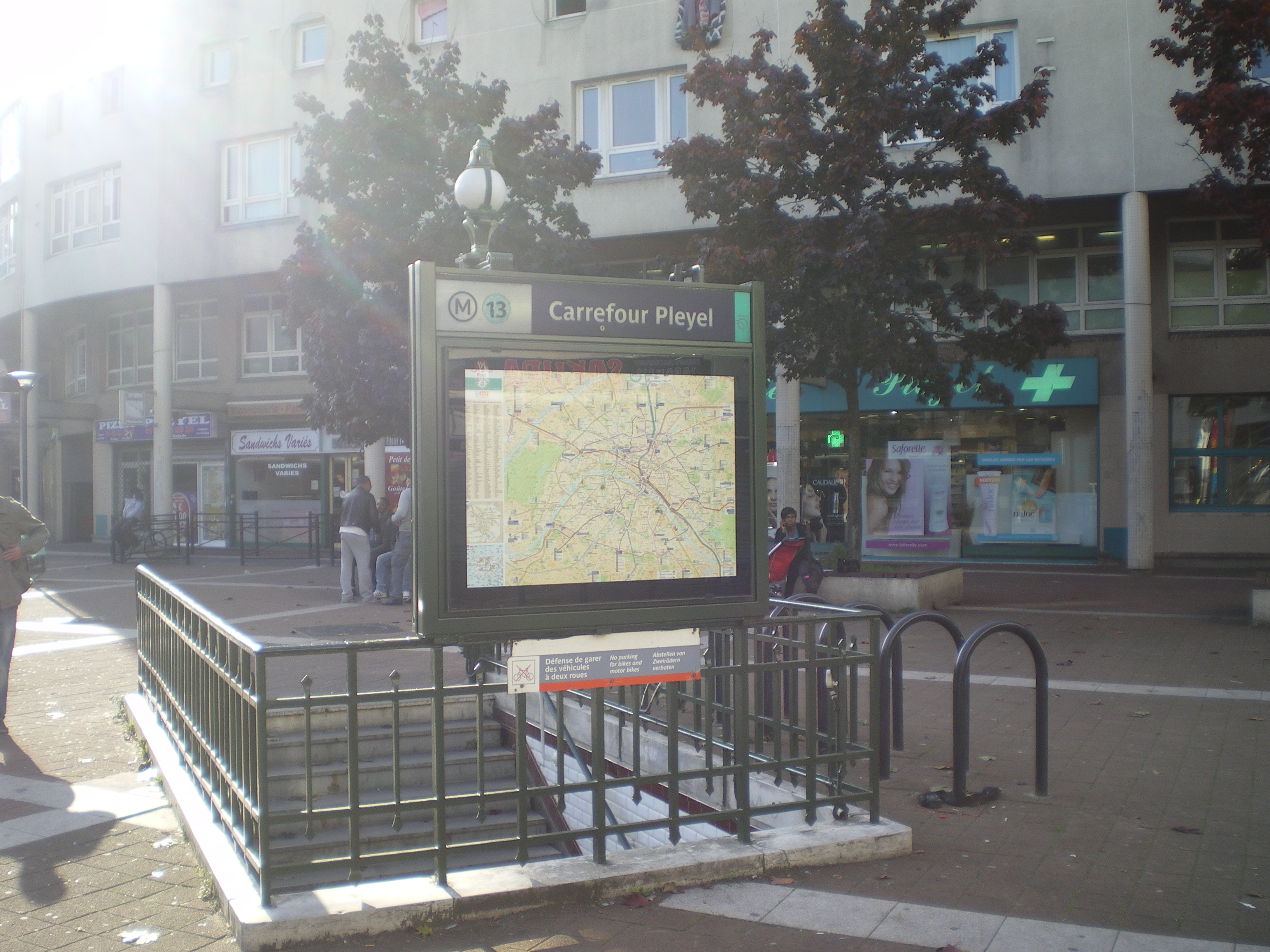 Station carrefour Pleyel